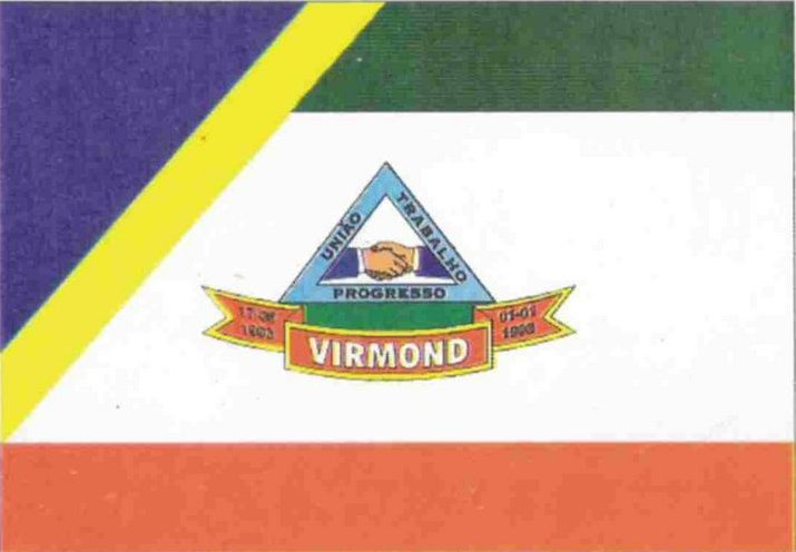 Bandeira do Município de Virmond, Paraná, Brasil.